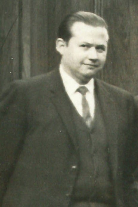 Julio Montt, político chuileno.